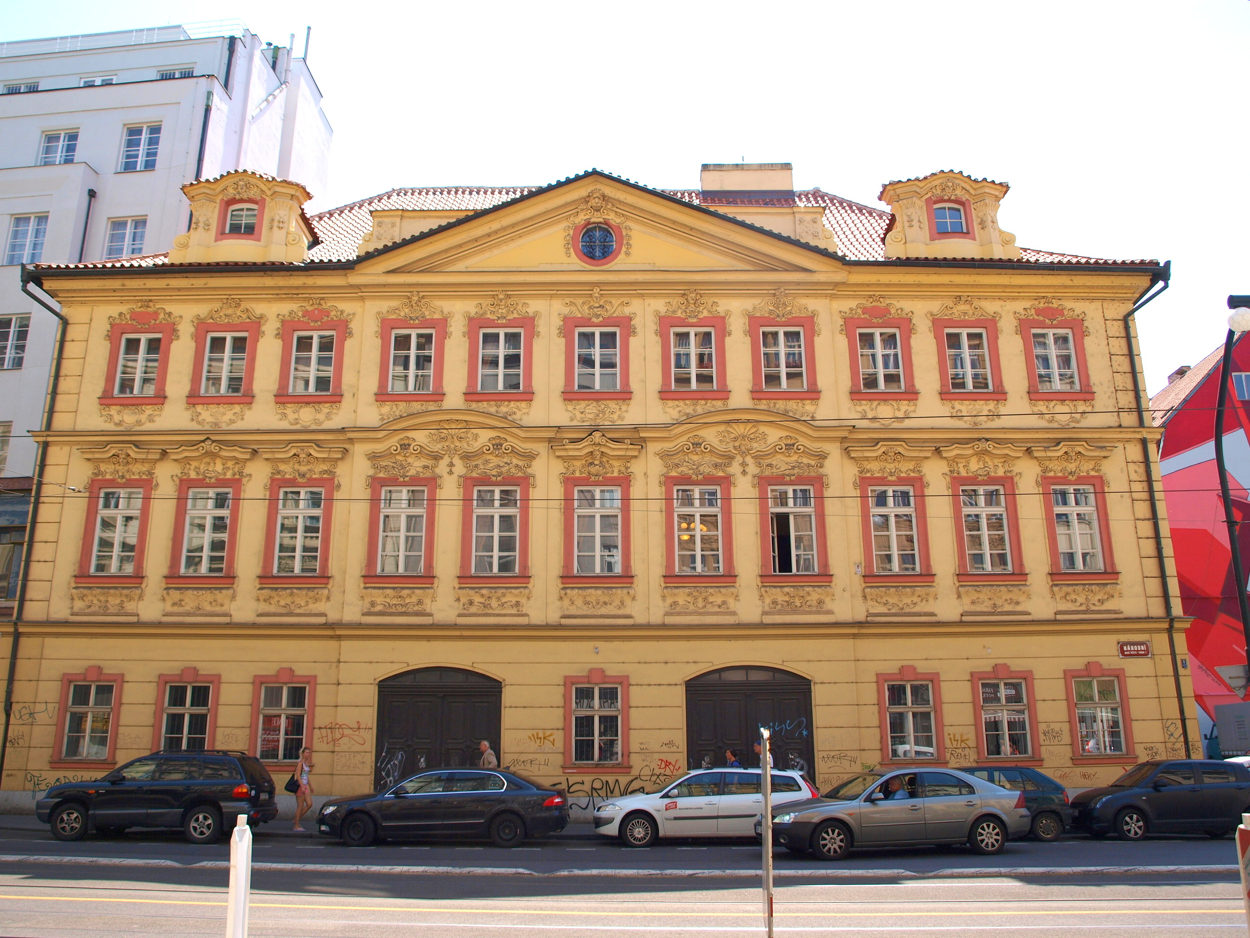 Schirdingovský palác